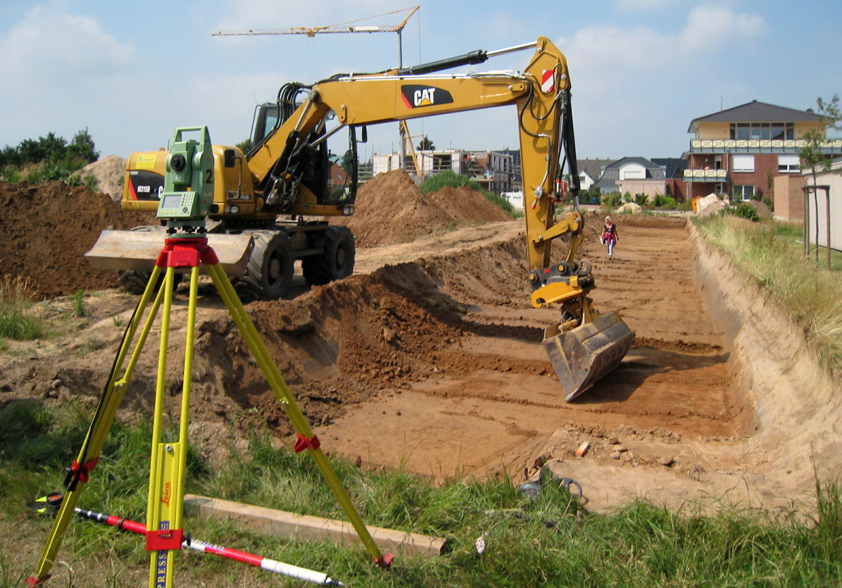 Ausgrabung auf dem Areal des Römerlagers Porta Westfalica